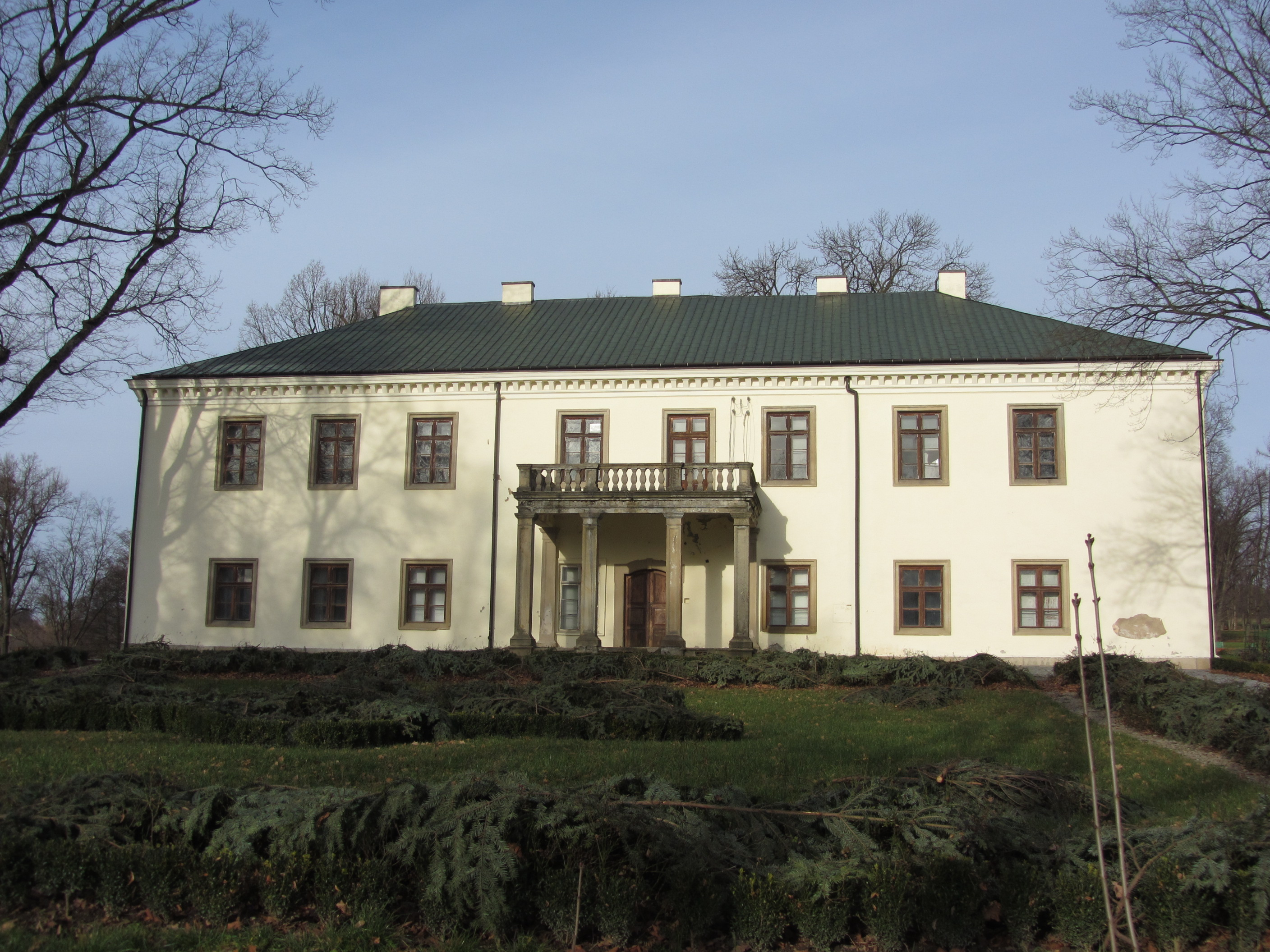 Wiśniowa, dwór, XVII, 1779-1780, 2 poł. XIX